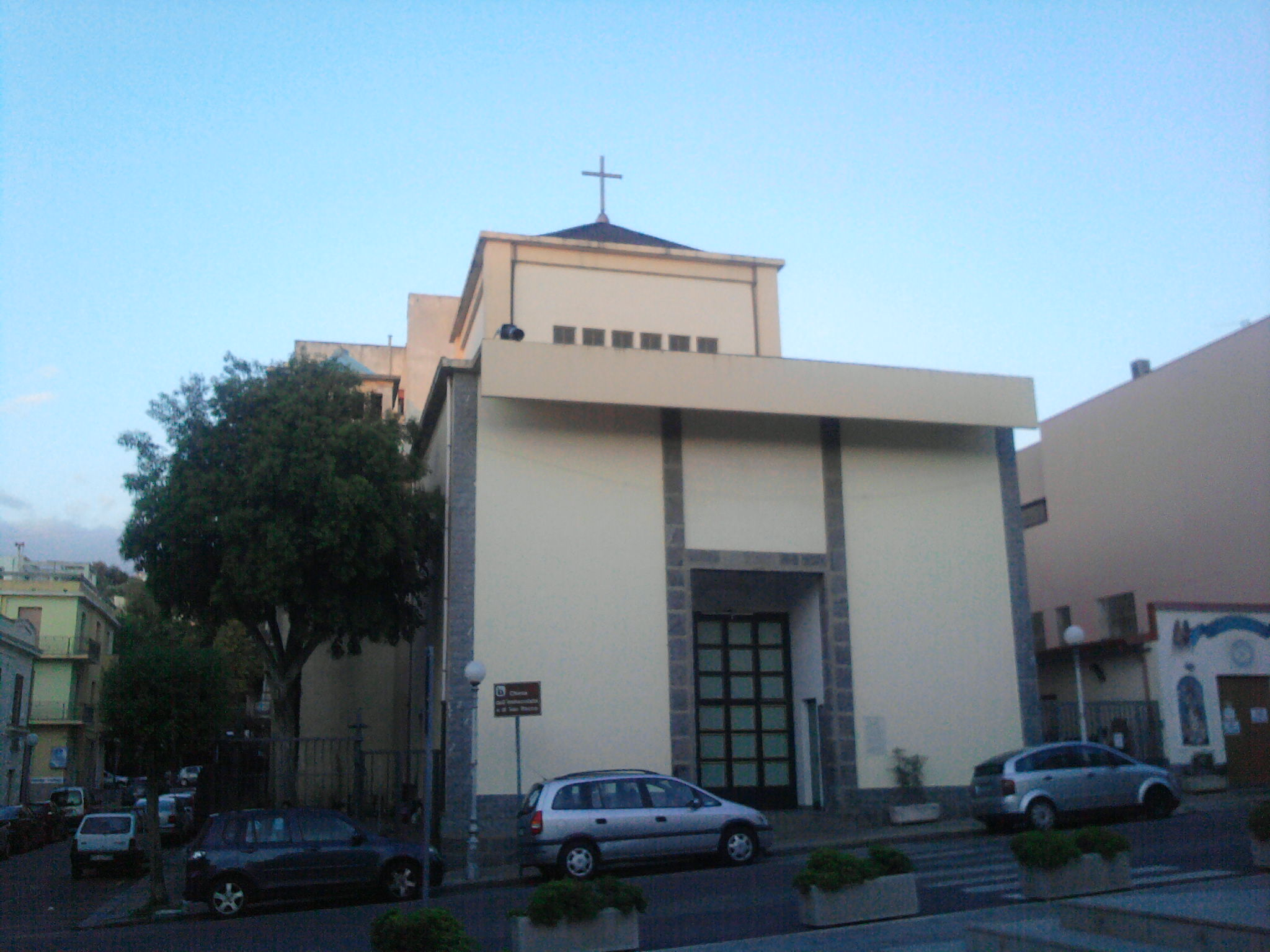 Chiesa di Maria Santissima Immacolata e San Rocco a Palmi. Al suo interno sono collocate le venerate statue di Maria Santissima Immacolata e di San Rocco, oltre a quella di Santa Rita e del Sacro Cuore di Gesù.